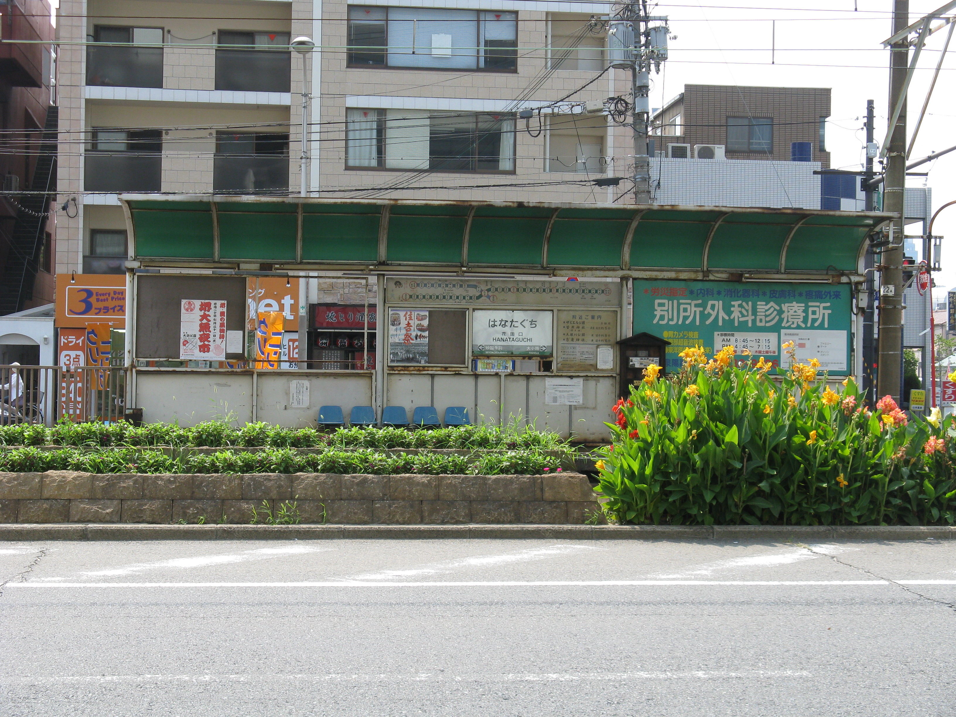 花田口駅